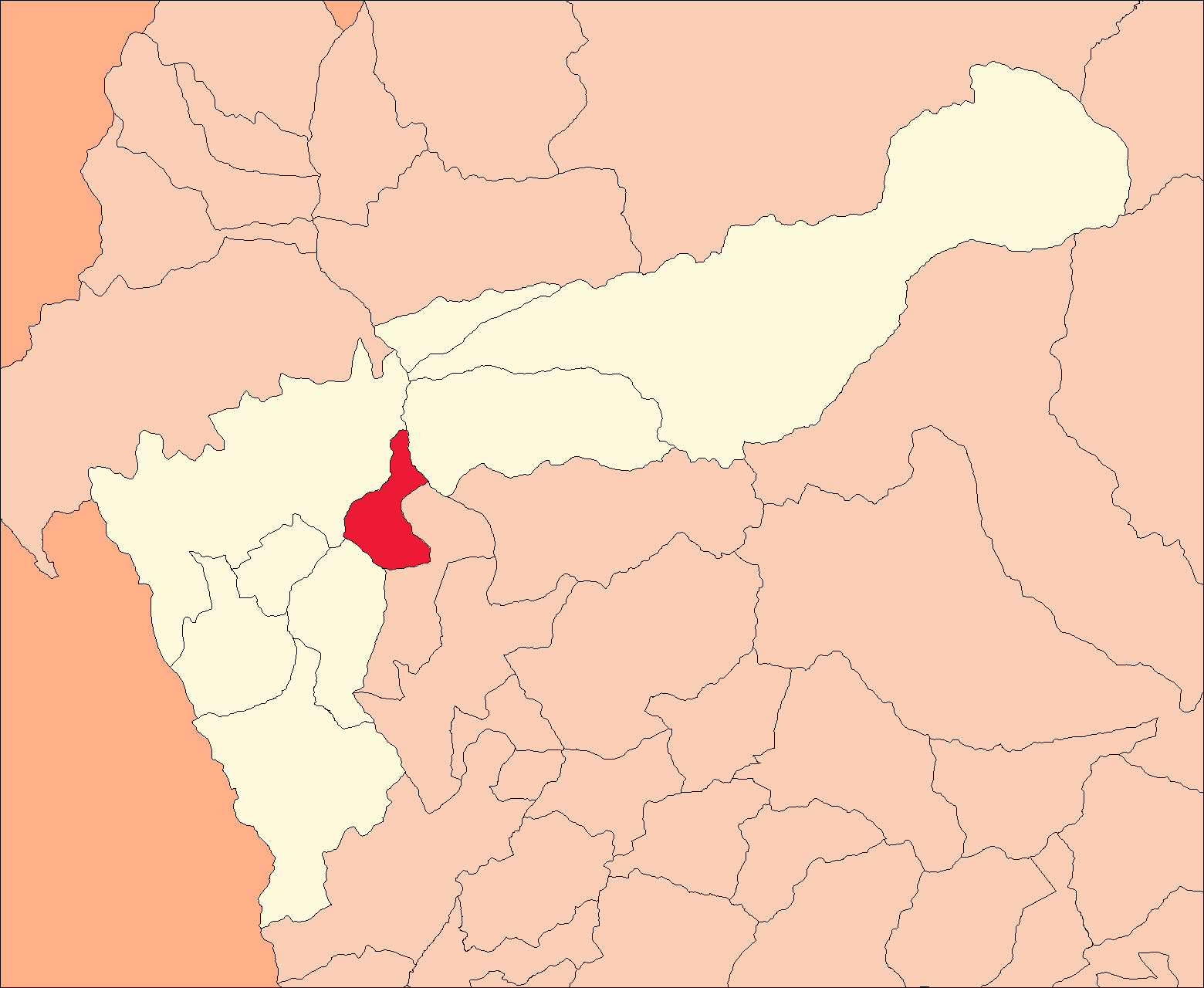 Ubicación del distrito de Yanas.